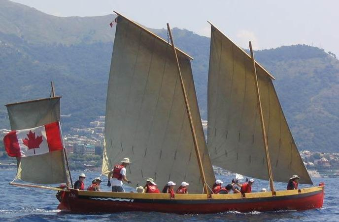 La yole canadienne "Ténacité" lors de la compétition Atlantic Challenge 2006, à Gênes en Italie.